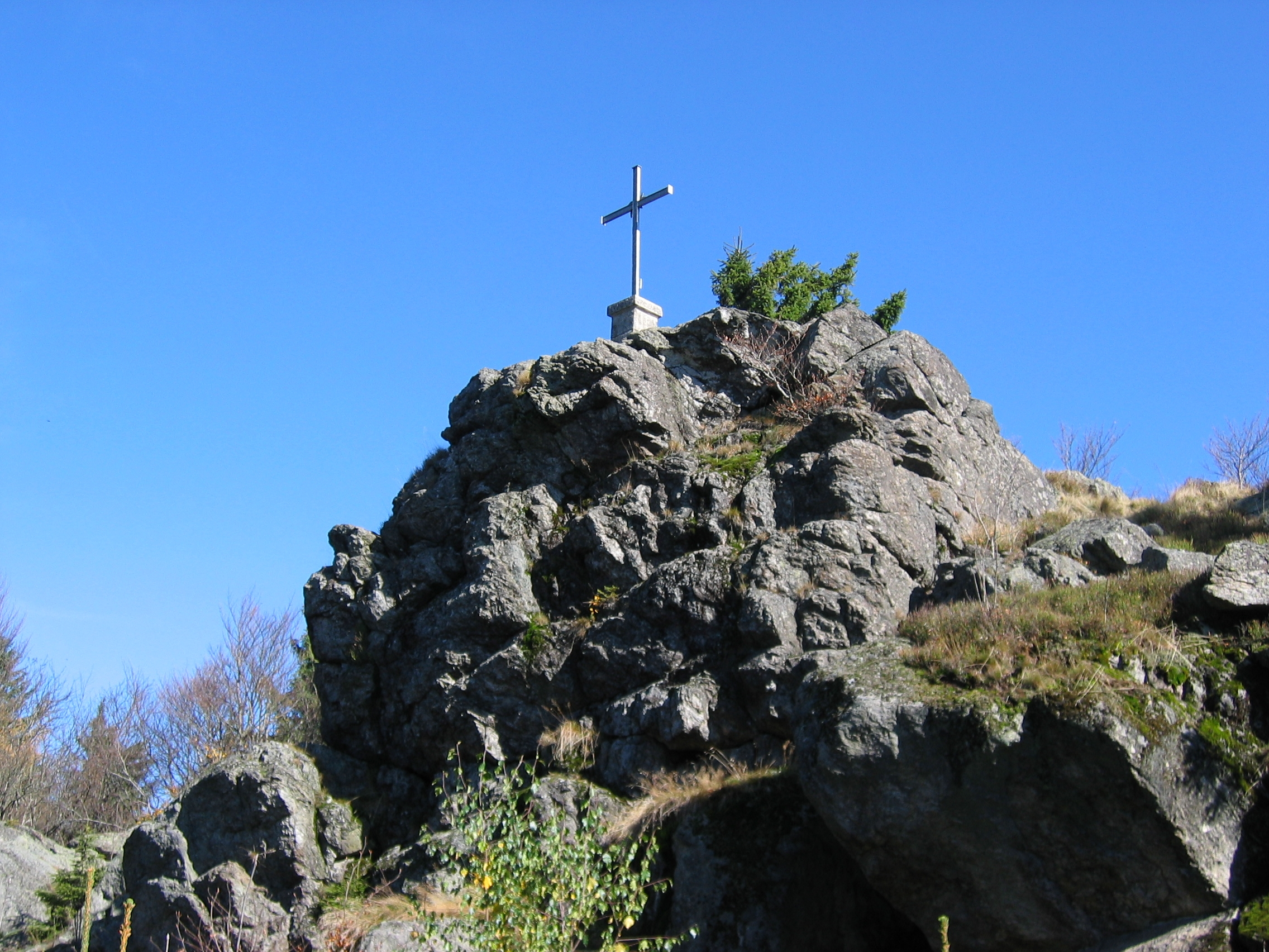 Gipfel Breitenauerriegel